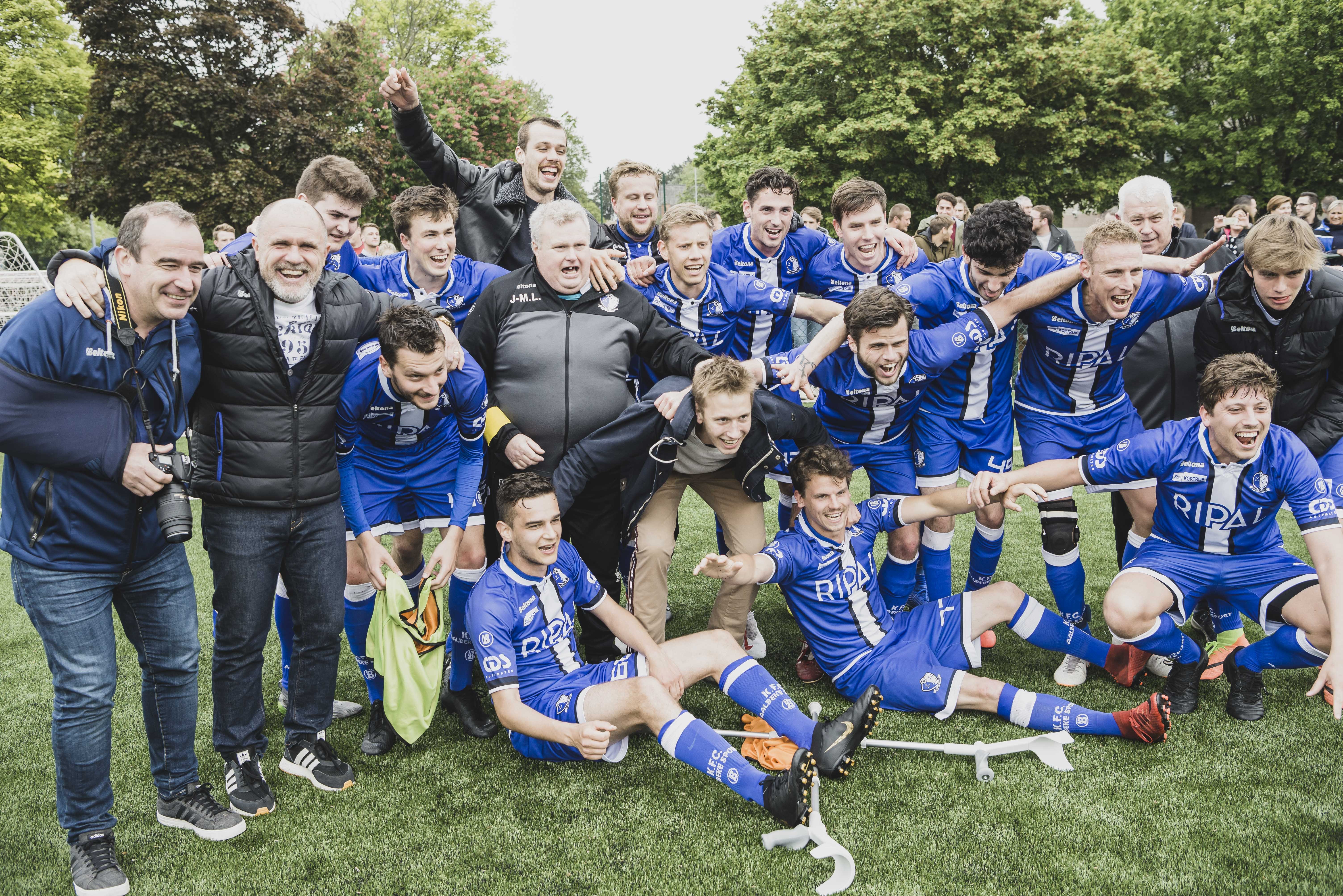 Vreugde na de promotie